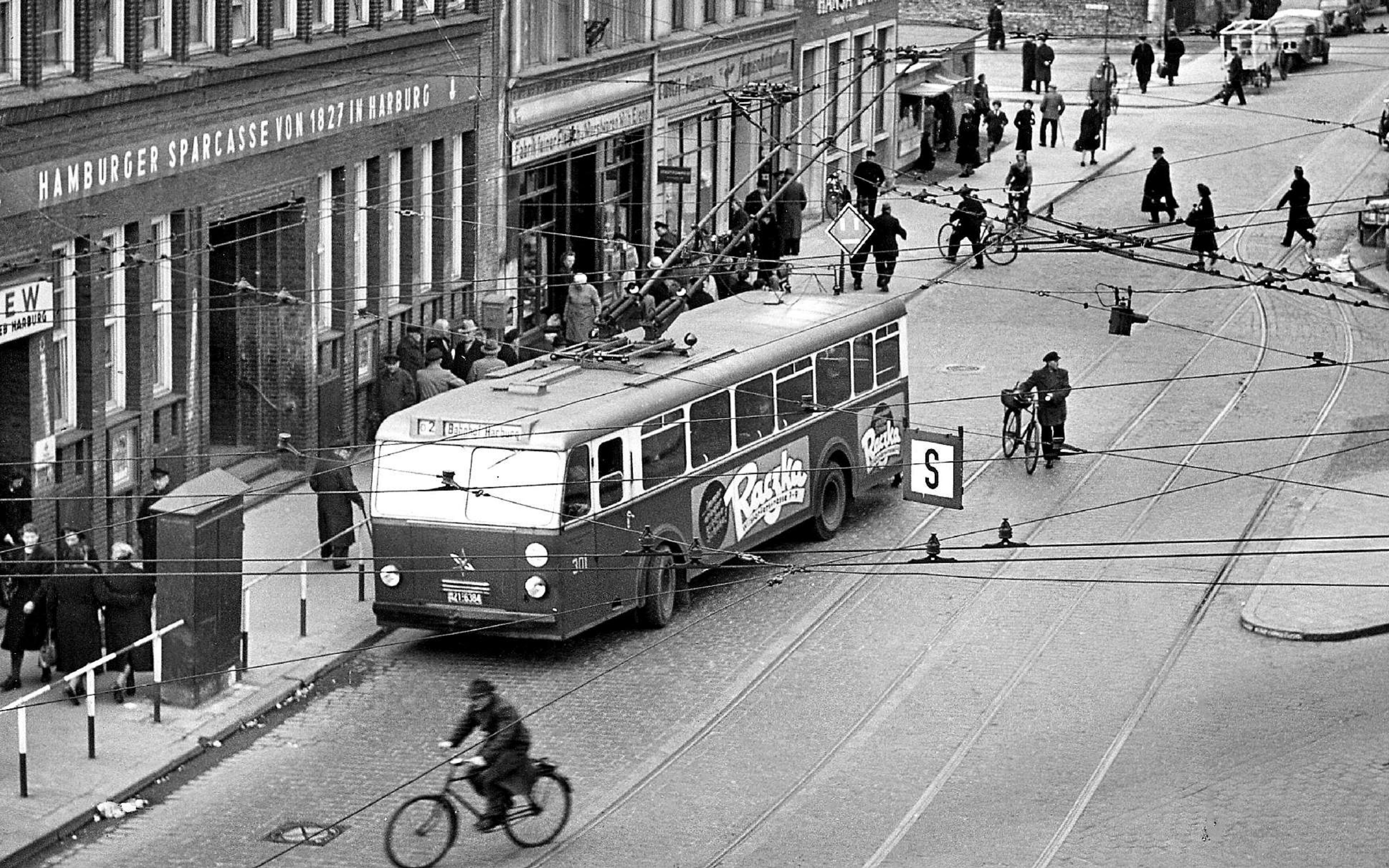 Erste O-Busse in Harburg (Umsteigepunkt "Sand"): Linie O-2 (Bf Harburg-Bostelbek), Modell Henschel/Wegmann 6500 als Ersatz für die Straßenbahnlinie "32"